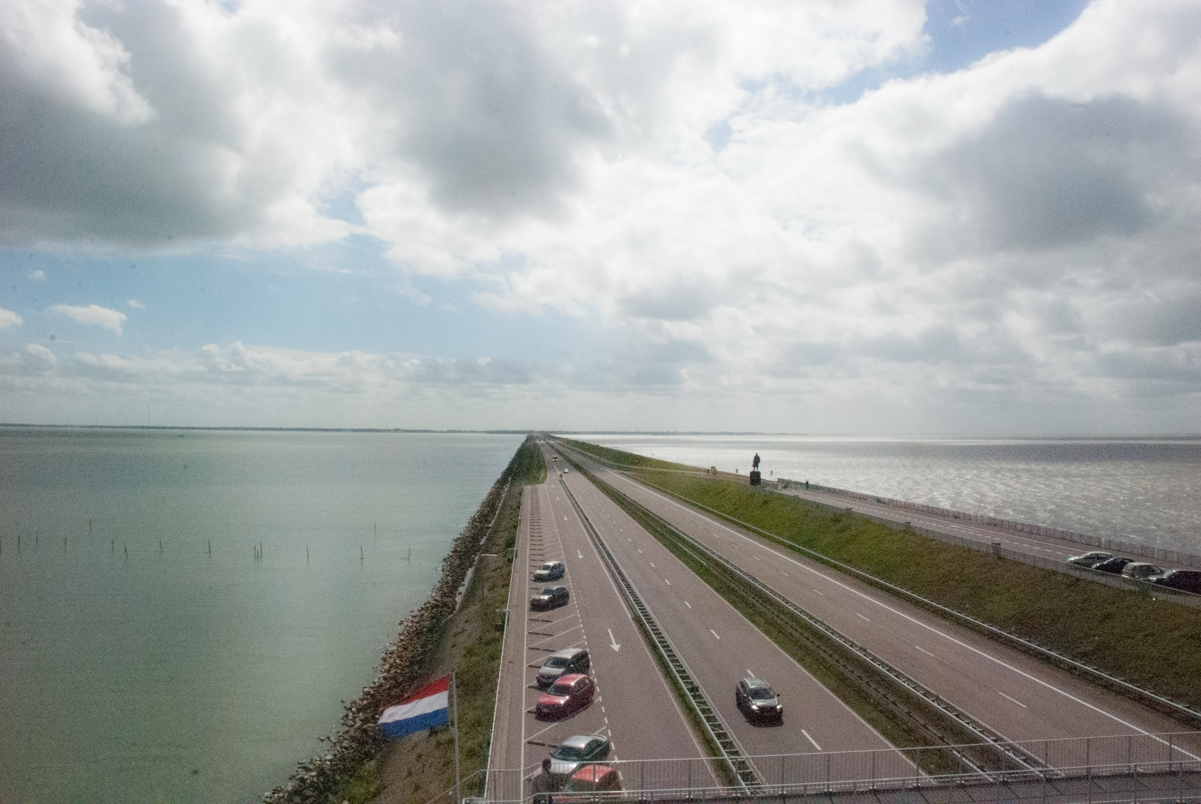 Der Abschlussdeich in den Niederlanden, aufgenommen vom Aussichtsturm in Blickrichtung Süden. Zur rechten Hand die Nordsee (Salzwasser), zur linken das IJsselmeer (Süßwasser).